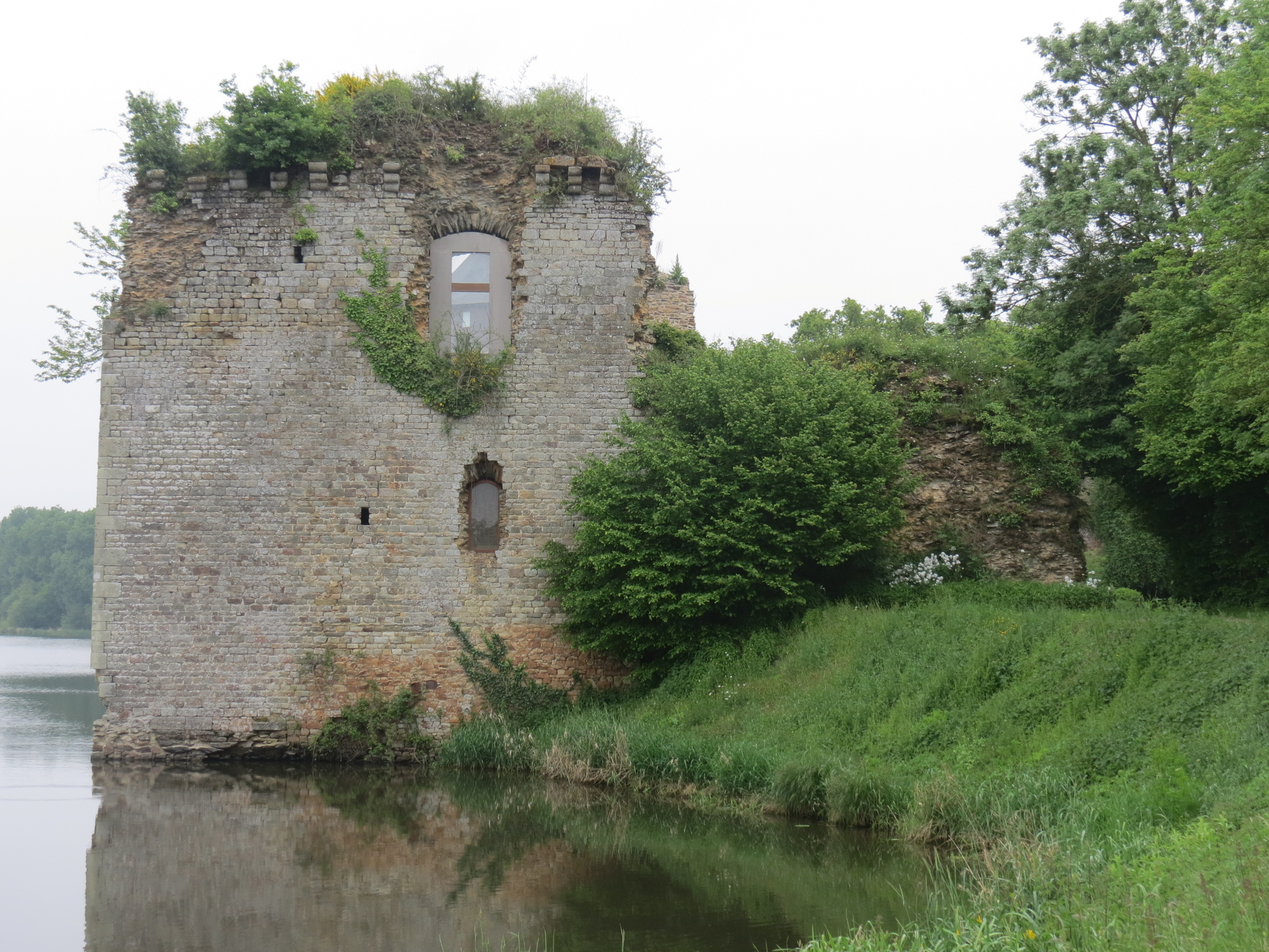 Montjean (53) - Château